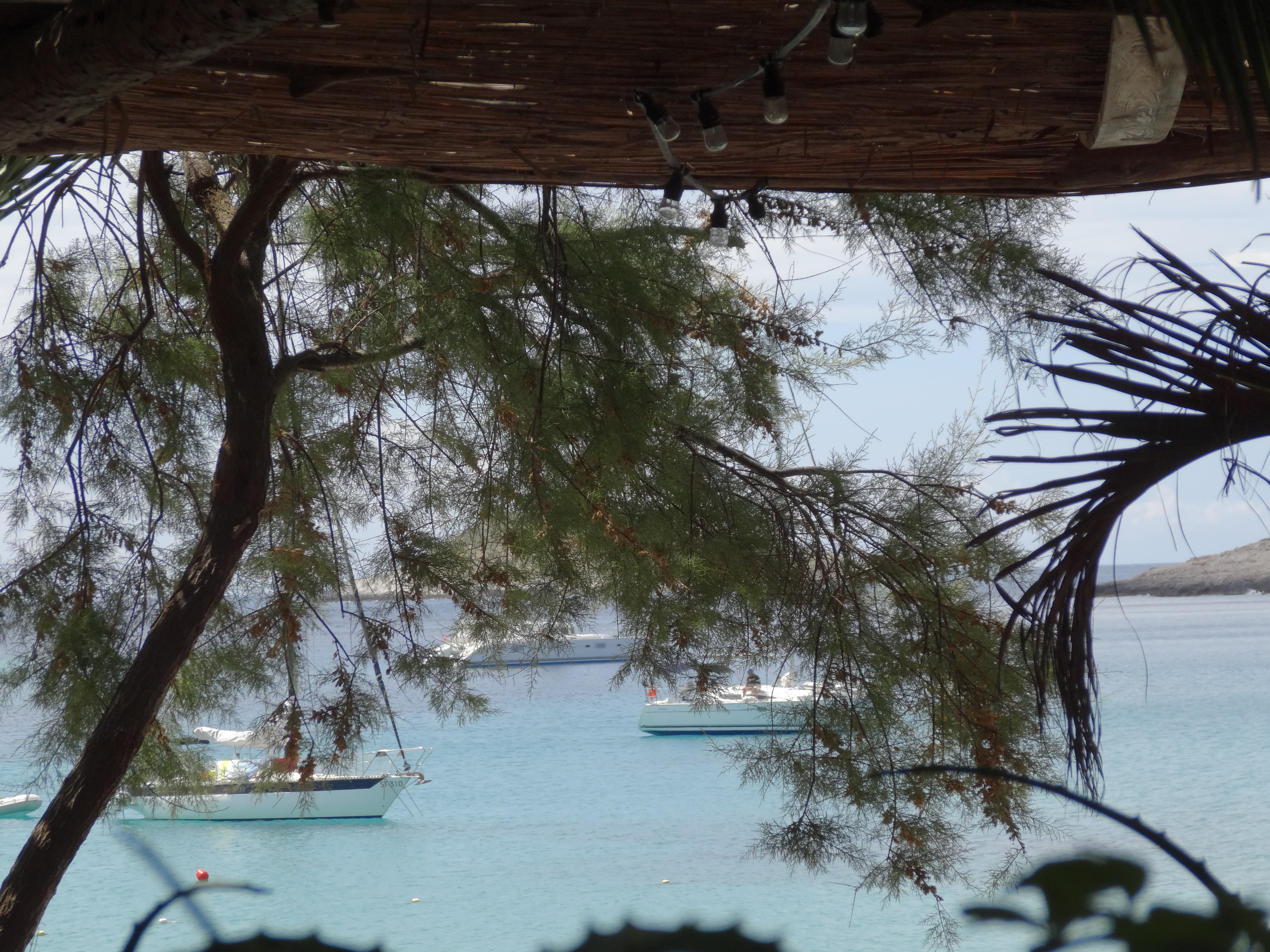 PALMIŽANA